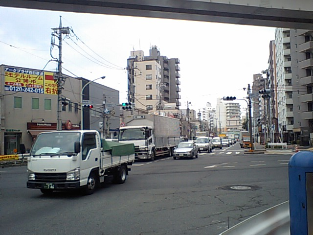 田端新町一丁目交差点（東京都北区田端新町一丁目）。西側より撮影。